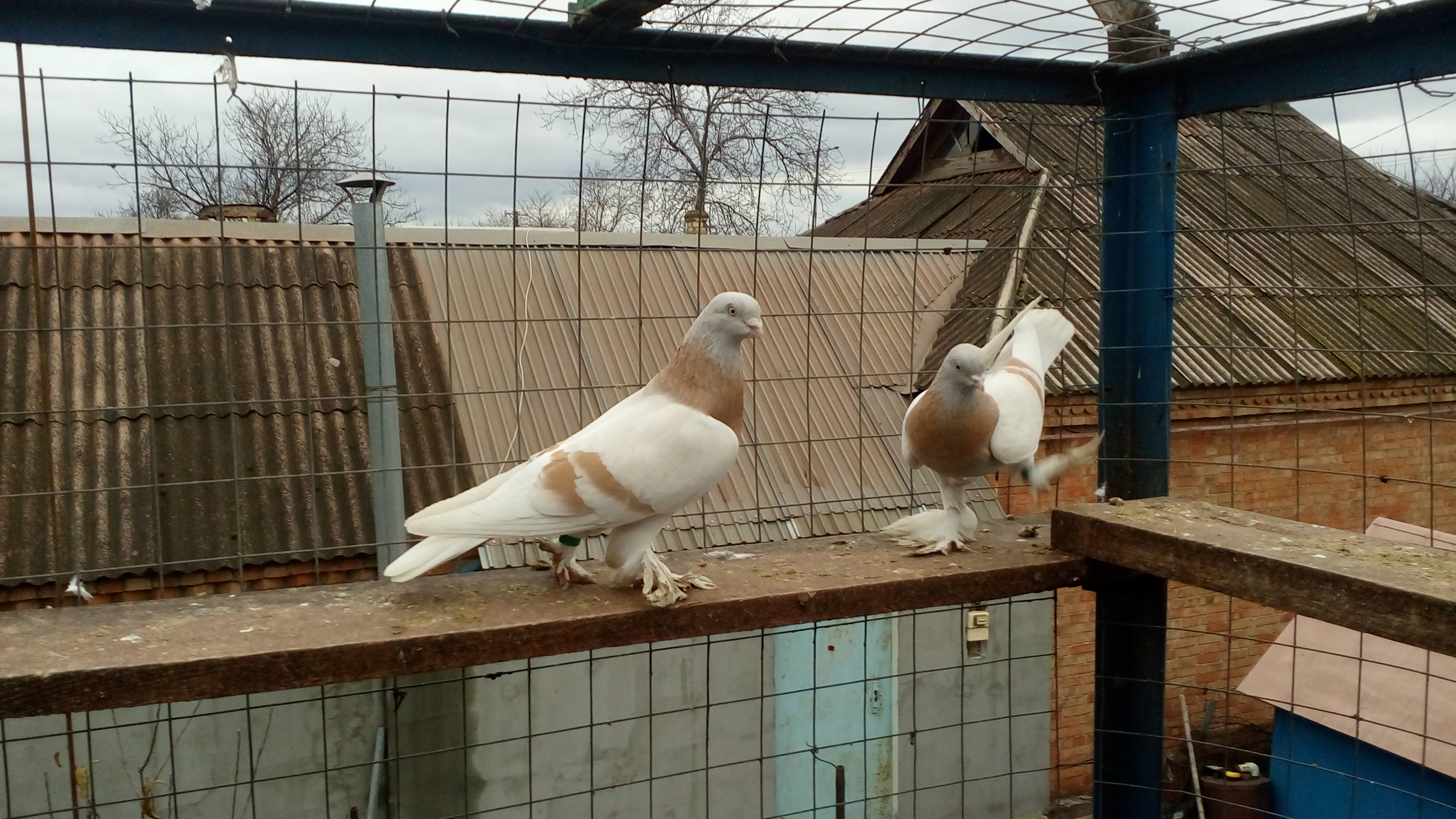 Агаран (Сливки верблюжего Молока) Туркменский Бойный голубь